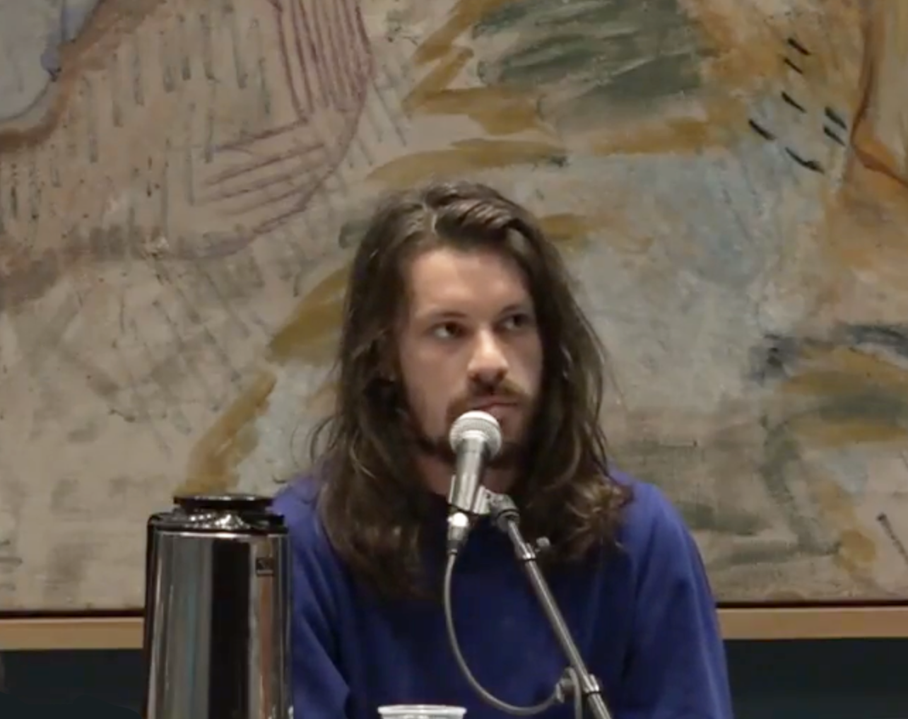 Håkon Hoffart snakker på Munch-museet 22. februar 2018